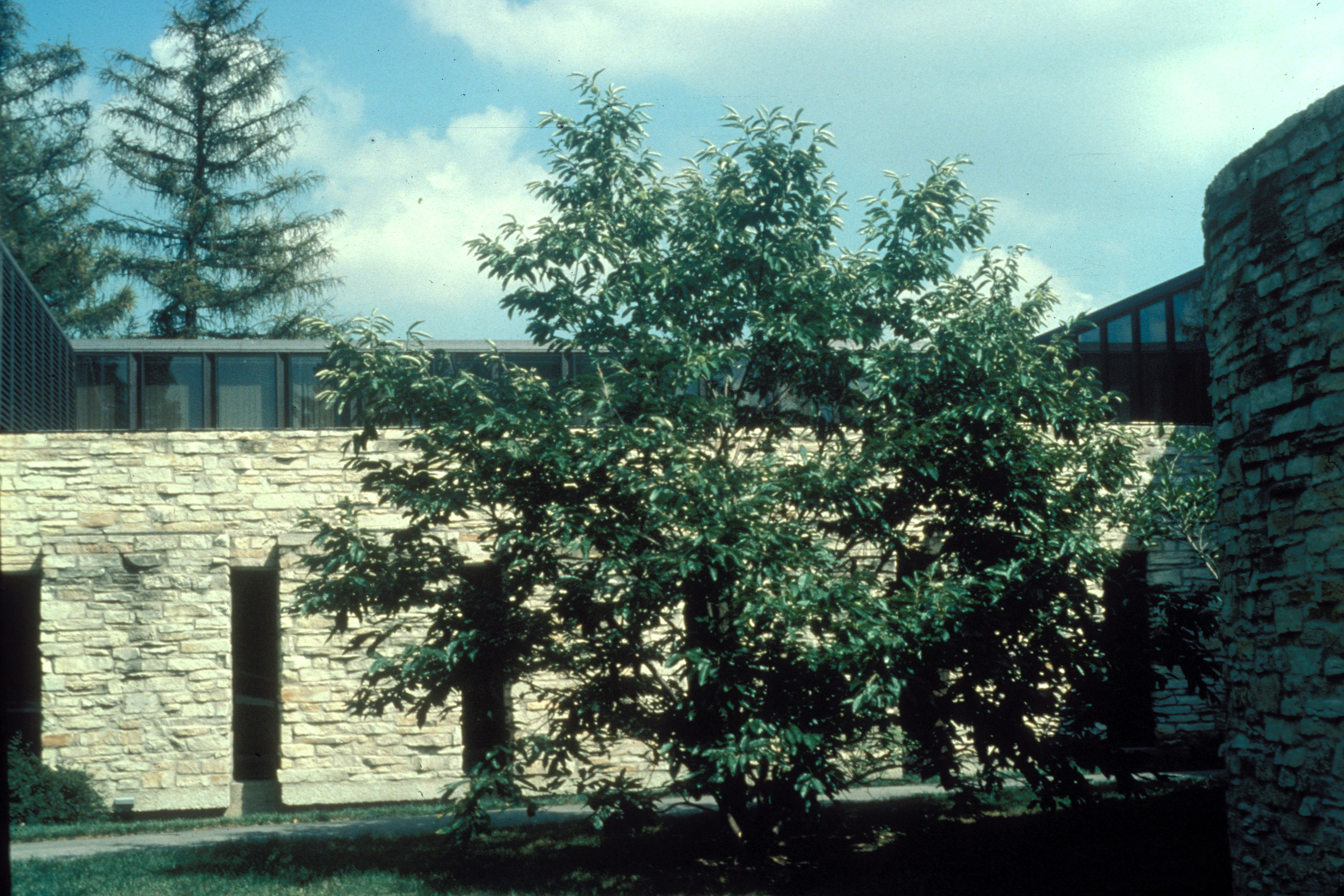 Castanea mollissima